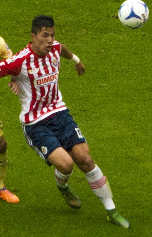 América vs Guadalajara